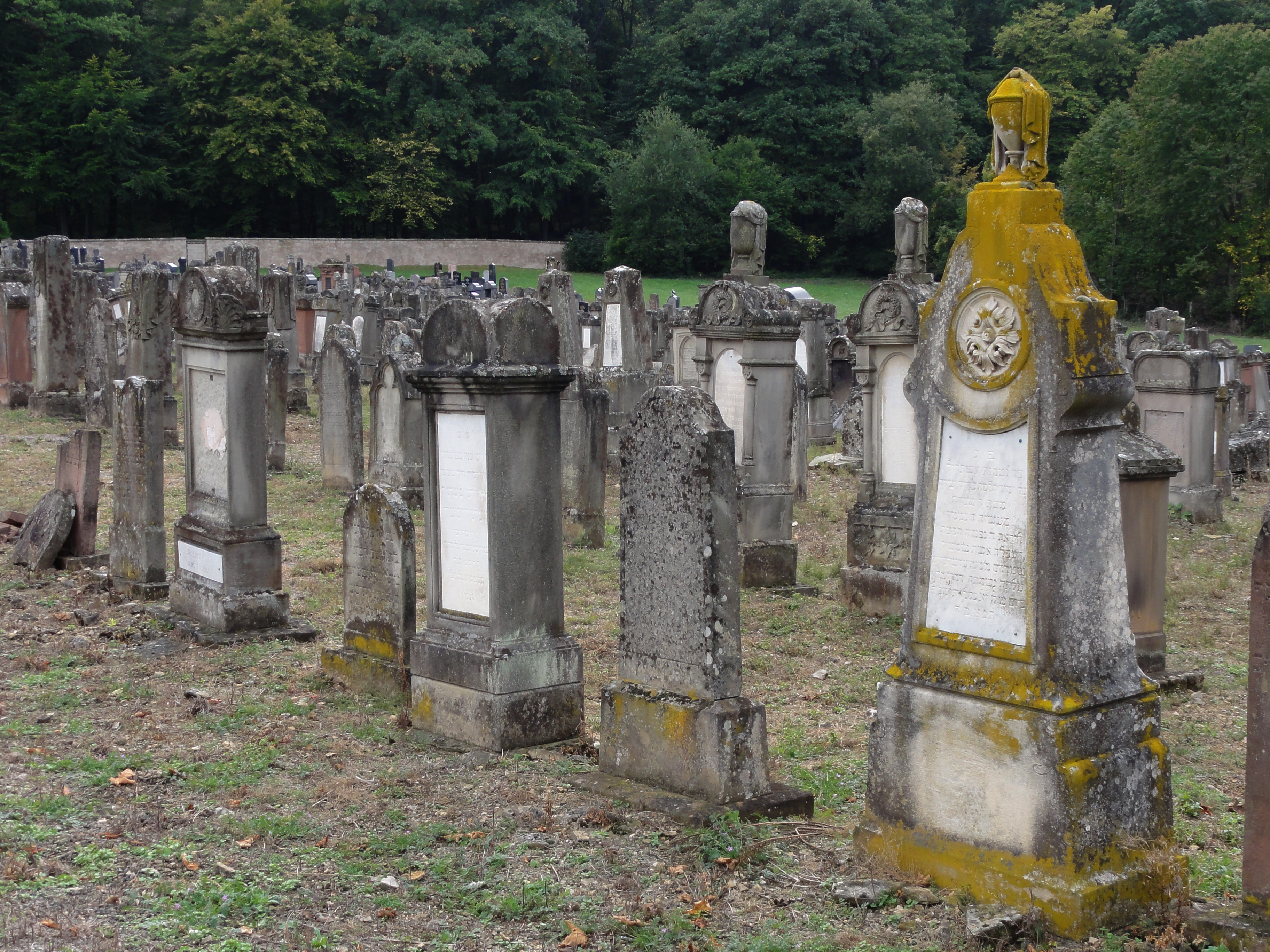 Alsace, Bas-Rhin, Rosenwiller, Cimetière juif (PA00135148, IA00075623) : Pierres tombales (XIXe).